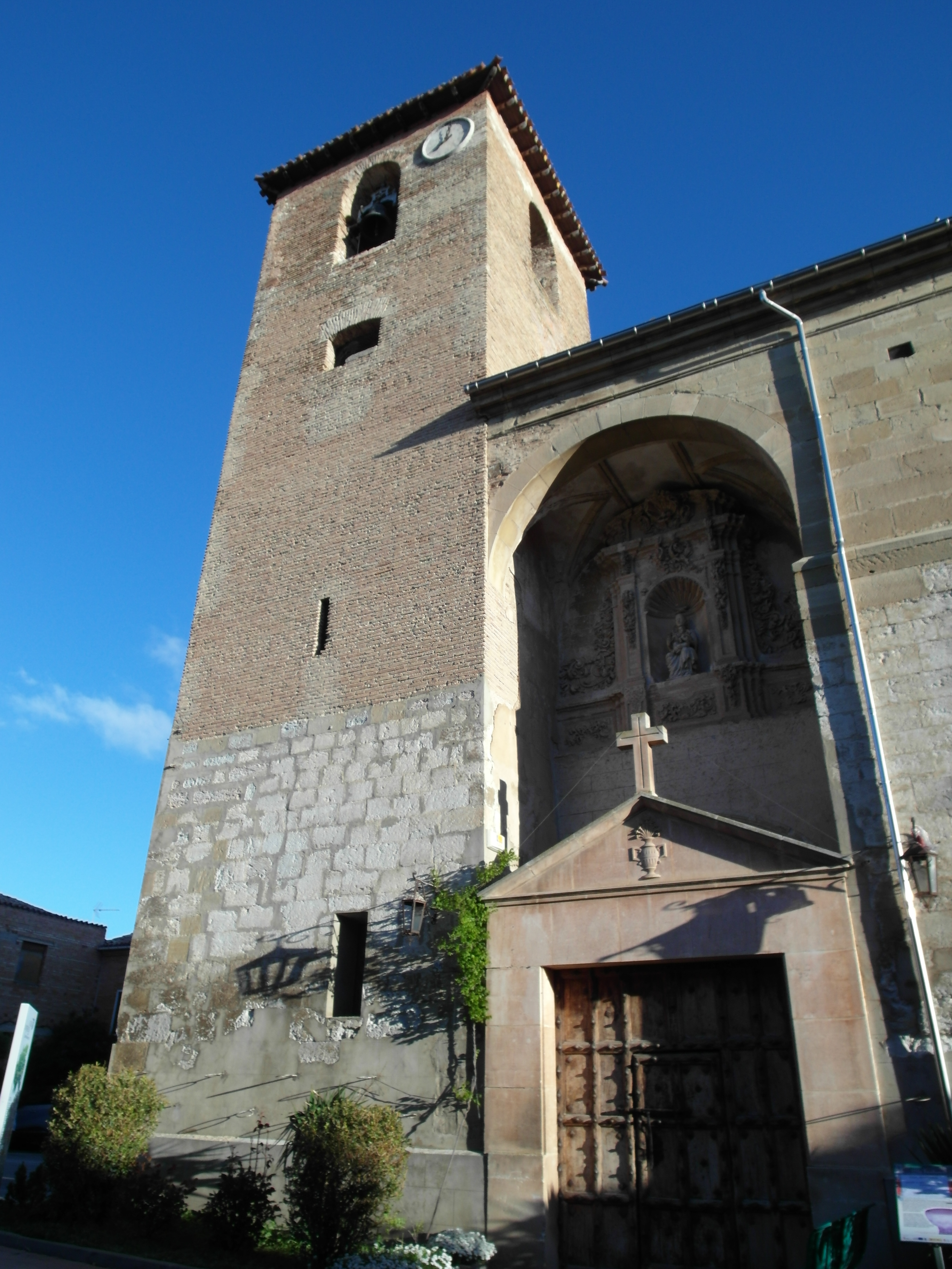 Redecilla del Camino, Burgos.